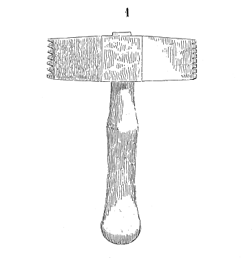 Outil de tailleur de pierre, façonné en forme de marteau tranchant et dentelé